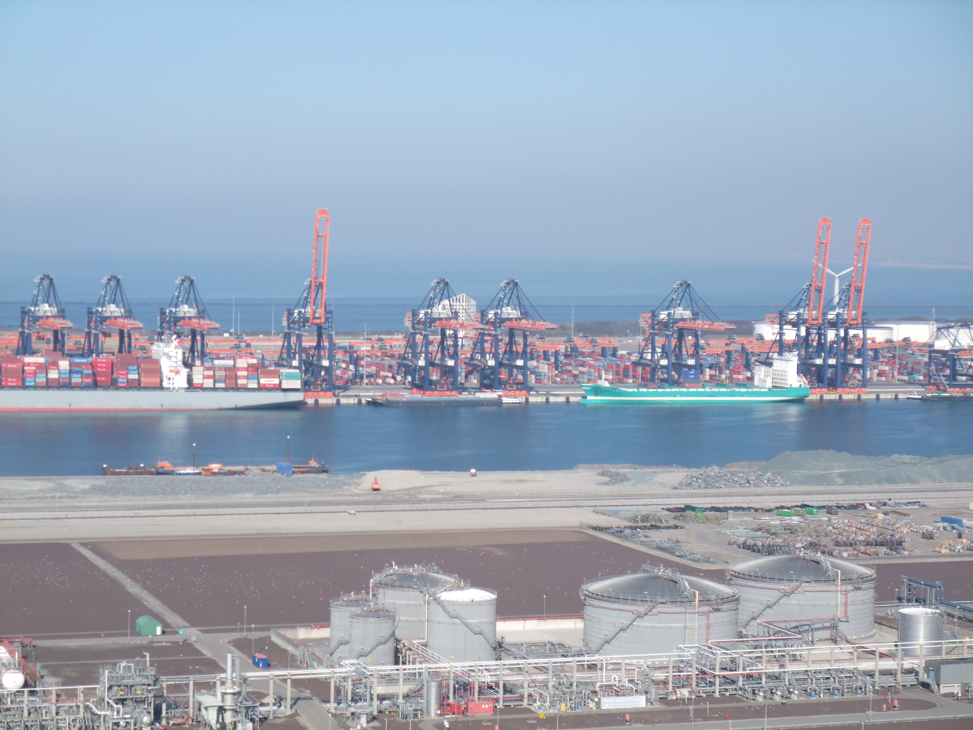 Maasvlakte, Rotterdam, Netherlands